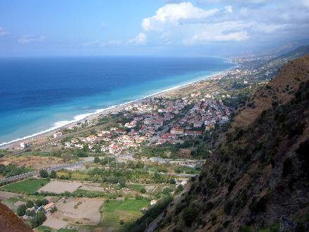 Fiumefreddo Bruzio, CS, Italia Alberto Panu